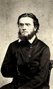 Lukas Adolf Bacmeister (1827-1873), Germanist